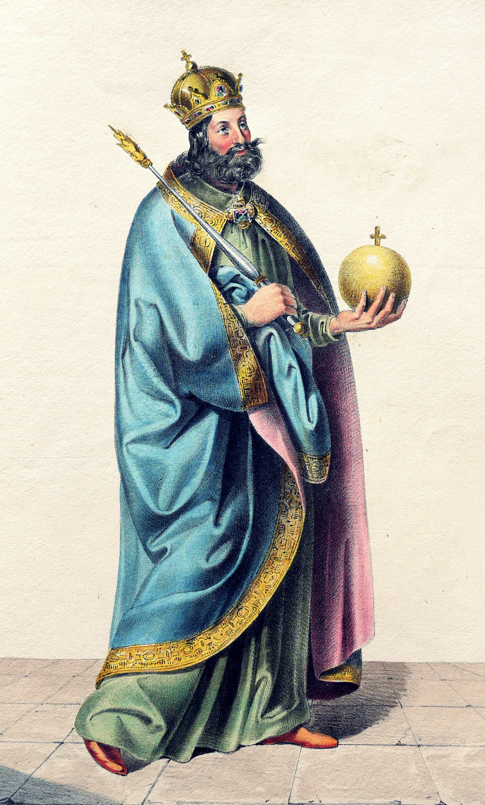 Stephan II. (1101-1131), König von Ungarn etc (1116-1131). Lithographie von Josef Kriehuber nach einer Zeichnung von Moritz von Schwind aus Ungerns Erste Heerführer Herzoge und Koenige In einer Reihe von Bildnissen von Bela bis auf Seine Majestät Franz I. Kaiser Von Österreich König Von Ungern &c., &c. Wien : Lithographisches Institut ;ca. 1828.